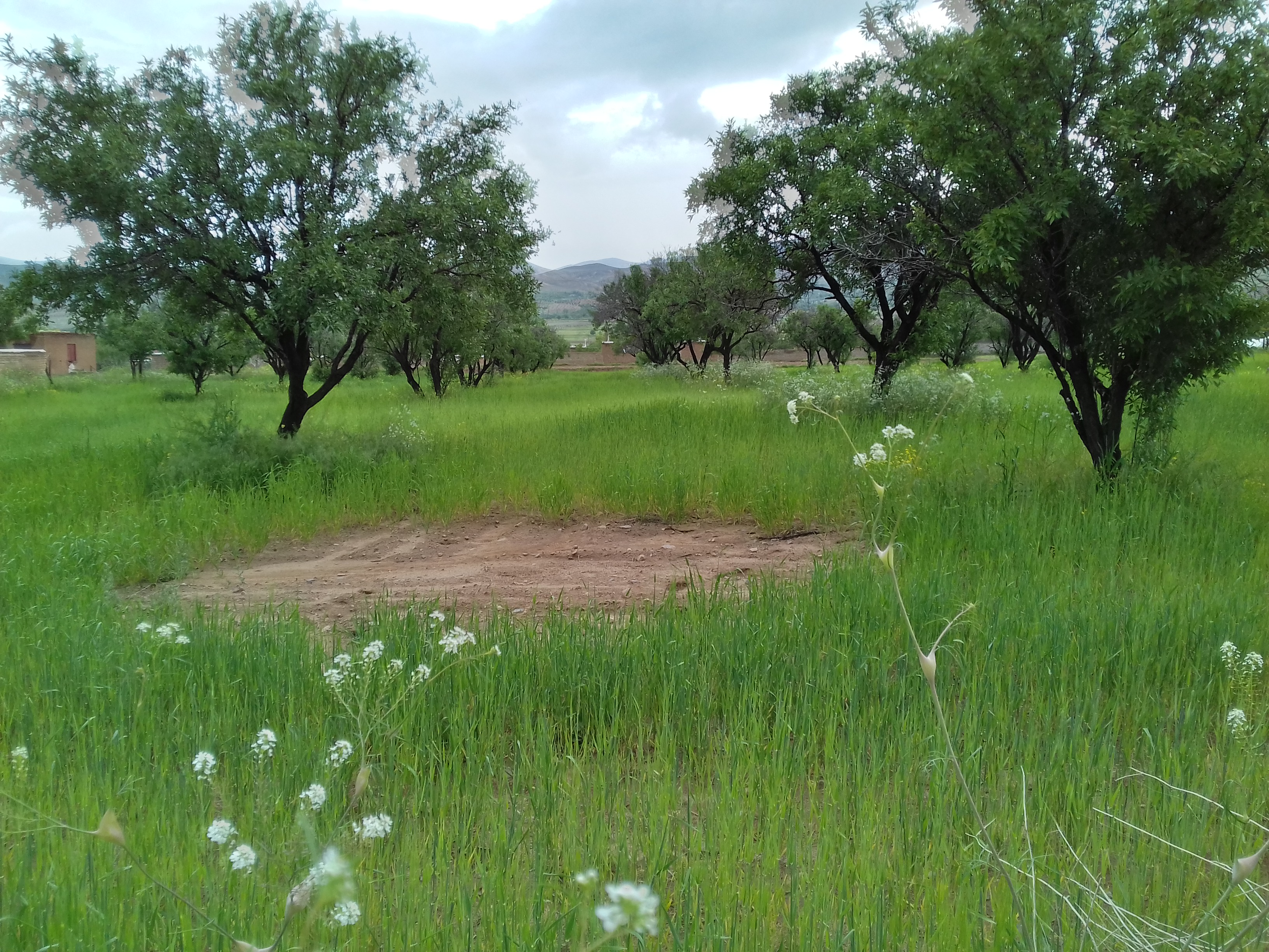 تصاویری از حومه روستای نجف آباد ارومیه، شامل طبیعت بکر و ورودی و... را مشاهده میکنید